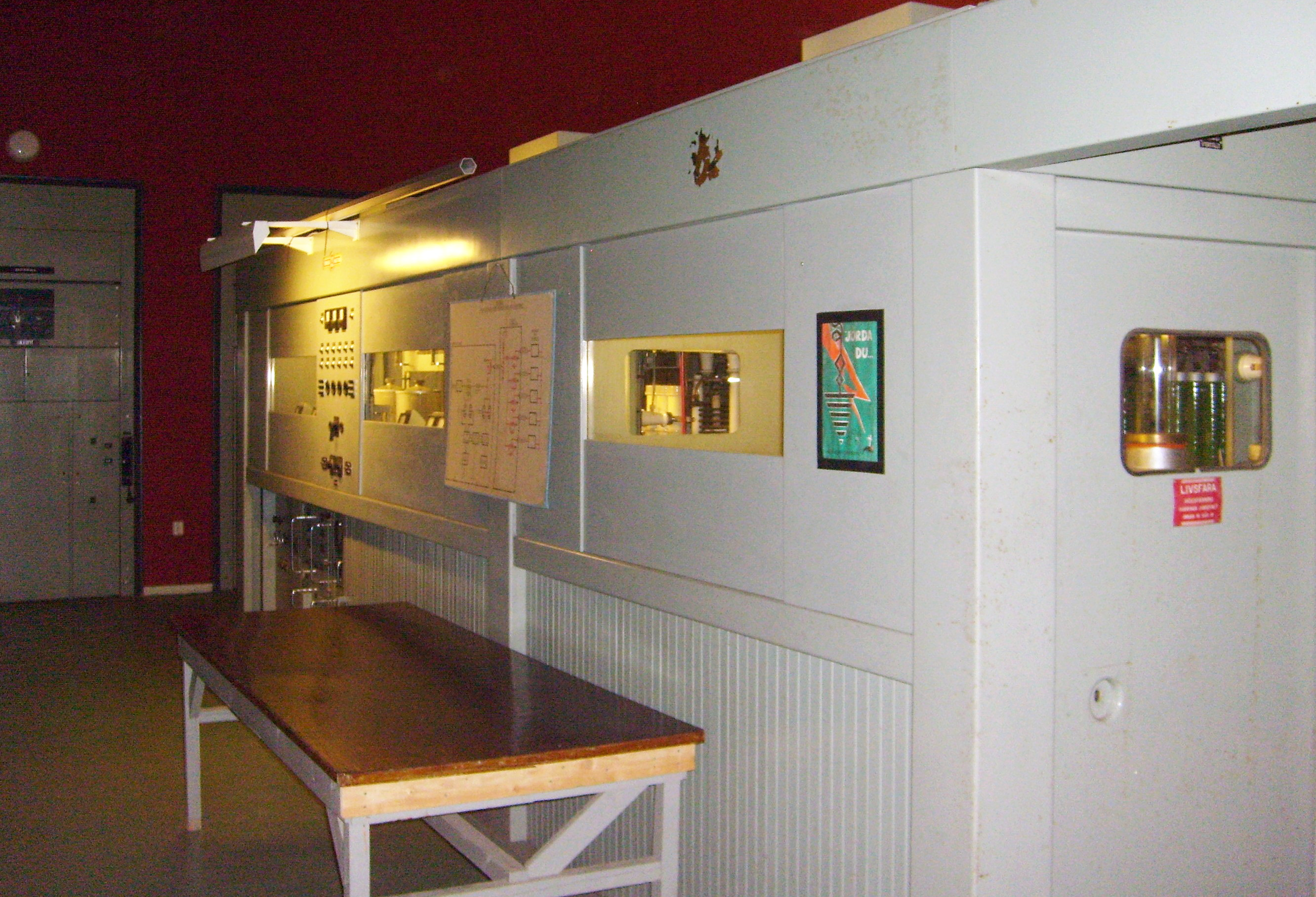 Den andra av de två 300kW radiosändarna vid Motala/Orlunda långvågssändare - fabrikat CFTH - Compagnie Français Thomson Houston